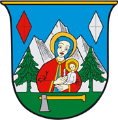 In blauem Schild, begleitet rechts von einer roten, links von einer silbernen Facetten-Raute, eine silberne dreispitzige Gebirgskette, unten ein grüner Schildfuß querhin belegt mit einem Holzfällerbeil an langem, goldenen Stiel. Dann zwischen zwei grünen Fichten wachsend die Madonna mit blauem Kopftuch und Kleid sowie goldverbrämtem roten Mantel, am linken Arm den silbern bekleideten Gottessohn tragend, beide Gestalten goldnimbiert